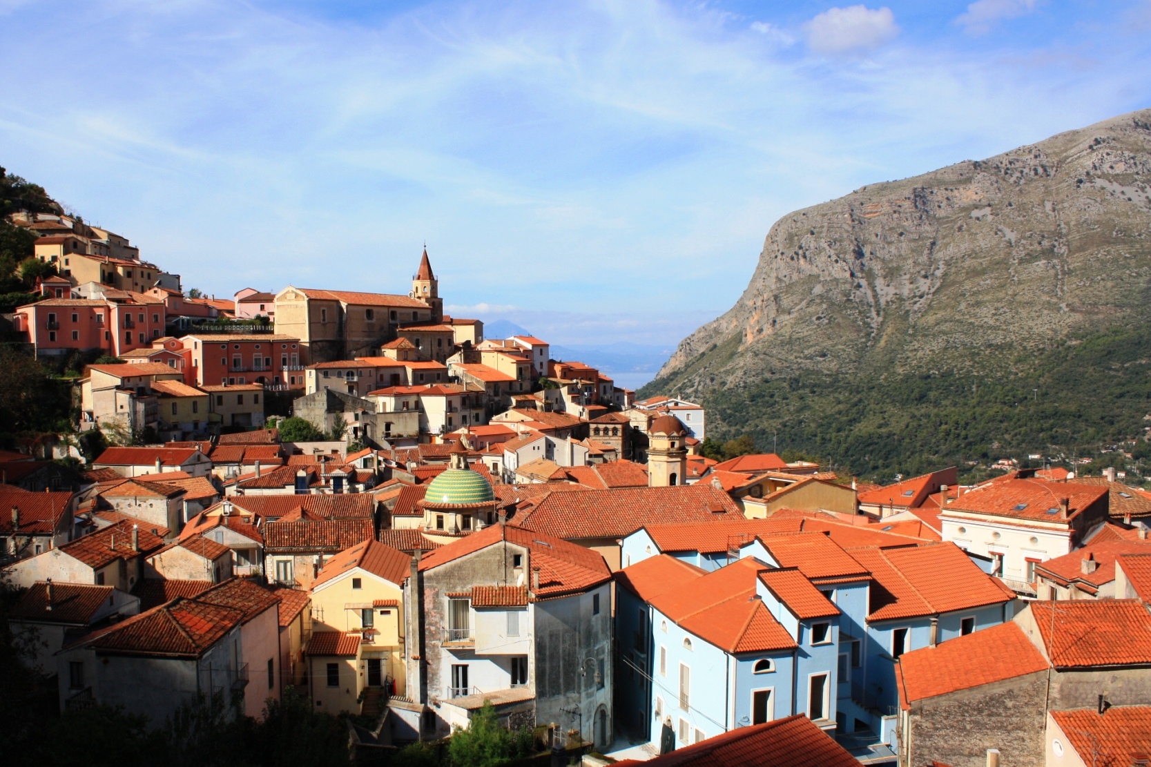 autore: Luke18389 fonte: sono l'autore descrizione: La foto rappresenta il centro-storico di Maratea, fotografato dalla località I Carpini. Licenza